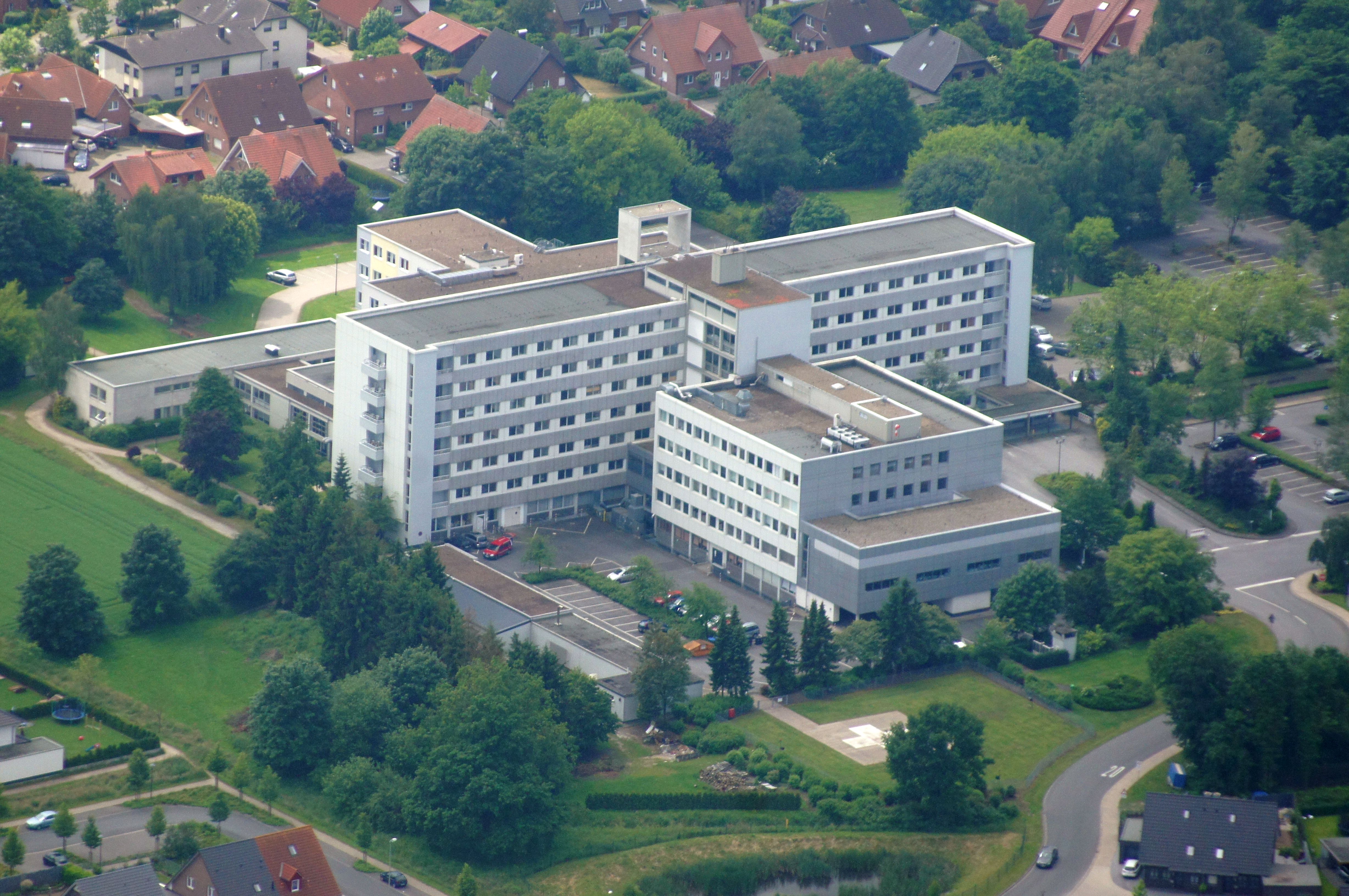 Das Warendorfer Josephs-Hospital, Nordrhein-Westfalen, Deutschland. Die Aufnahme entstand während des Münsterland-Fotoflugs am 1. Juni 2014. Hinweis: Die Aufnahme wurde aus dem Flugzeug durch eine Glasscheibe hindurch fotografiert.